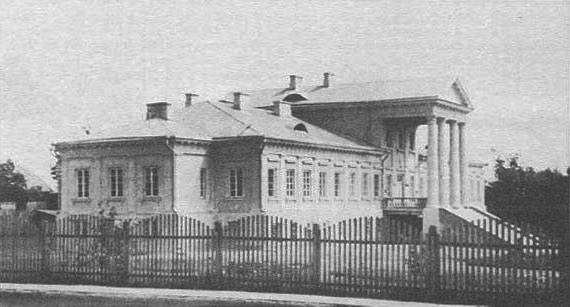 Беларуская (тарашкевіца): Валожын (Vałožyn), палац Тышкевічаў (Tyškievič)